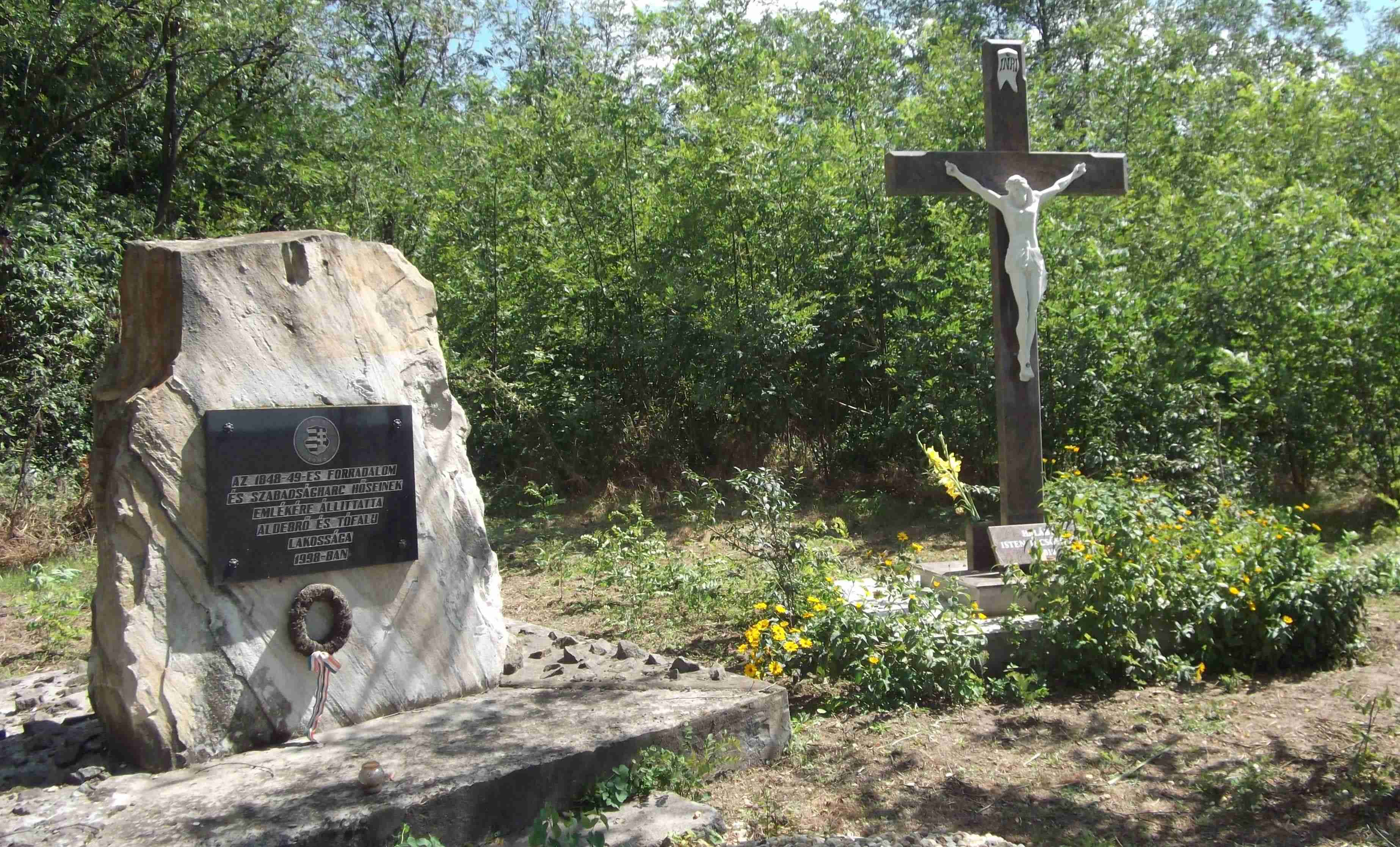 Honvédhalmi kiskút, Tófalu